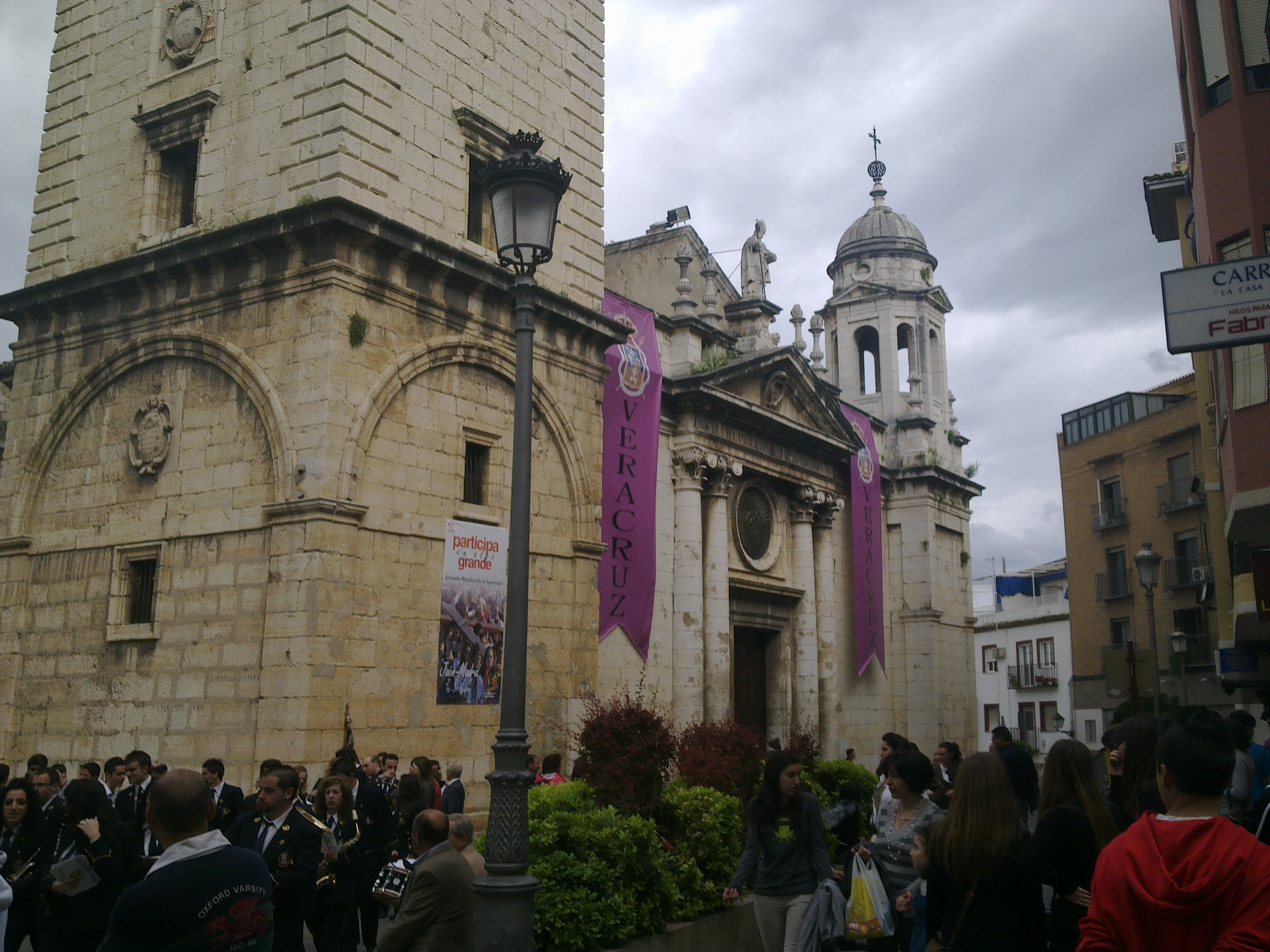 La Iglesia de San Ildefonso de Jaén durante la semana Santa, engalanada para la salida de la Vera-Cruz.